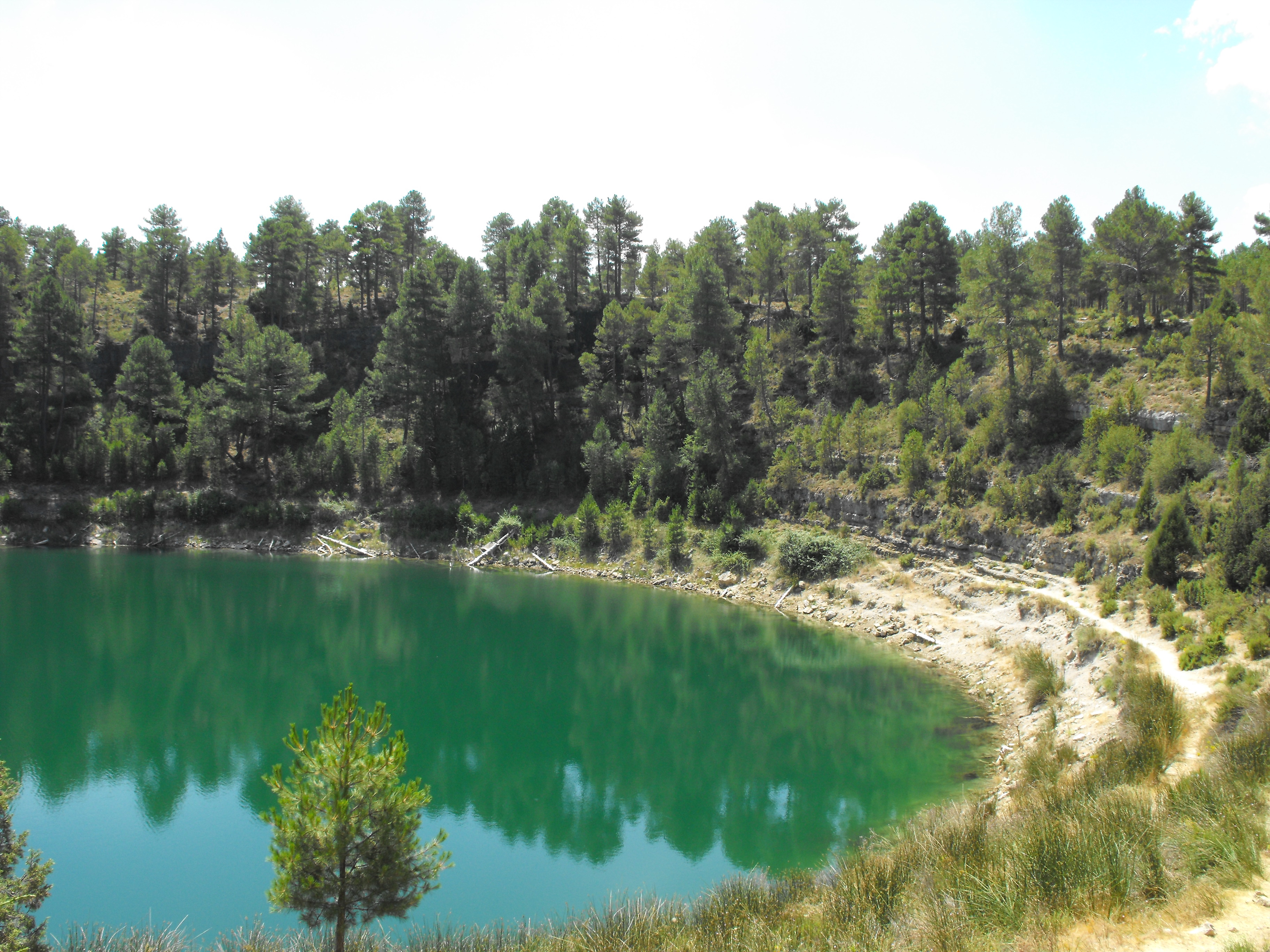 Laguna gitana - Cuenca - Spain